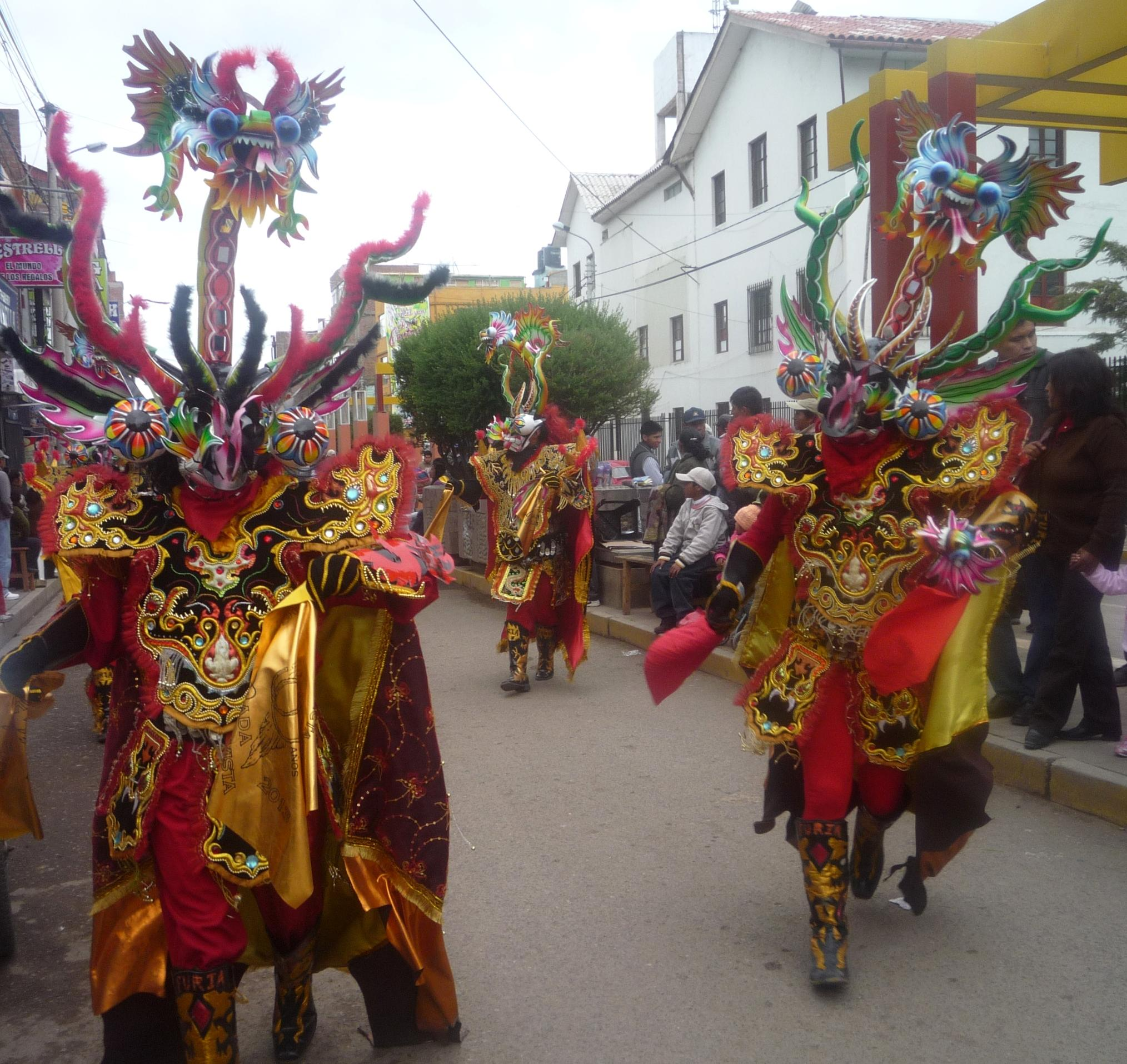 Candelaria de Puno Peru